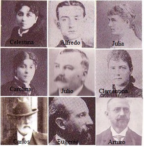 Composición fotográfica con los retratos de los hermanos Bertrand Renard.